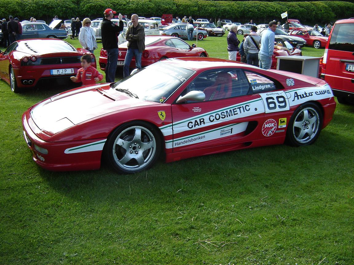 Ferrari F355 Challenge